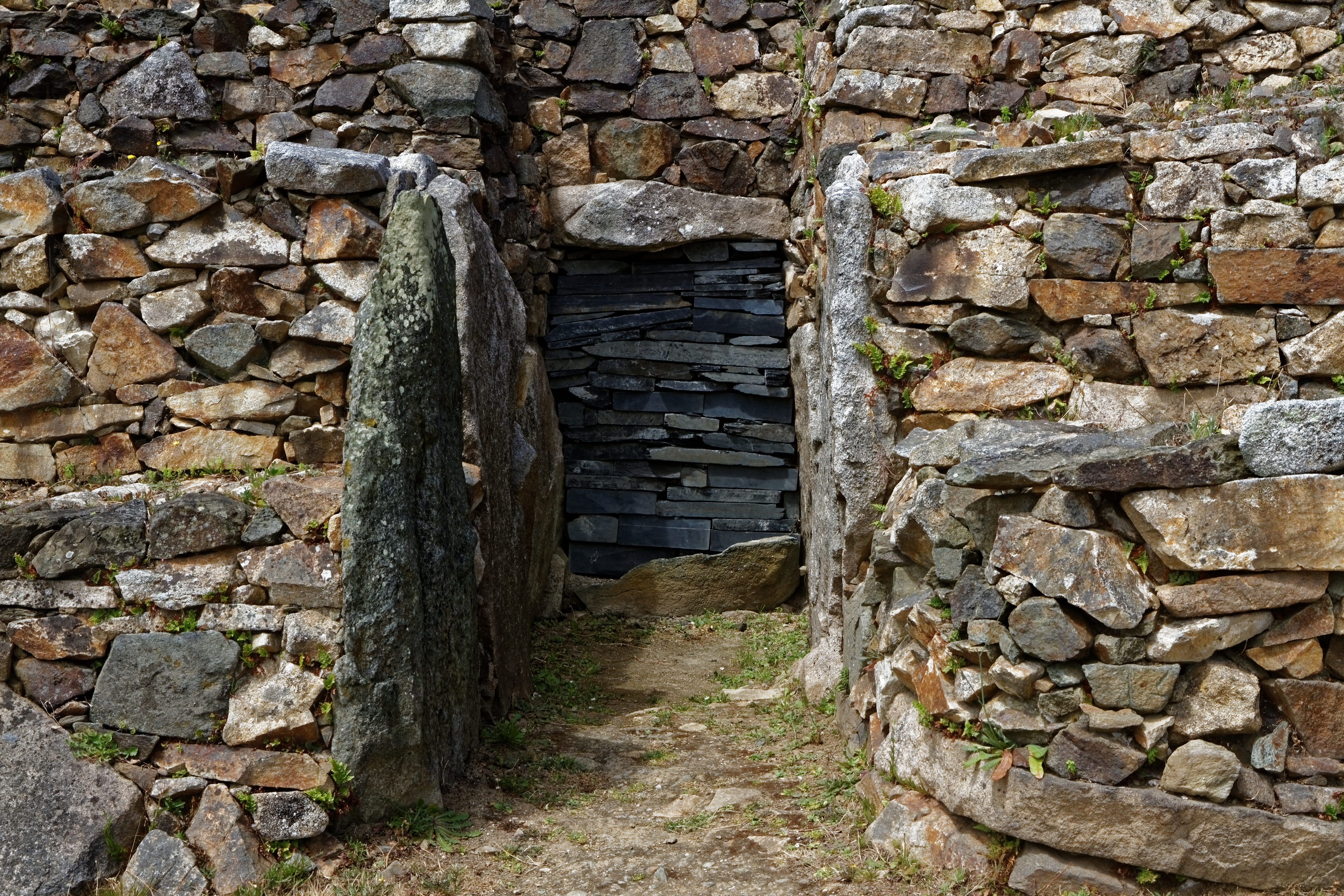 Panorama du Cairn de Barnenez à Plouezoc'h dans le Finistère. .